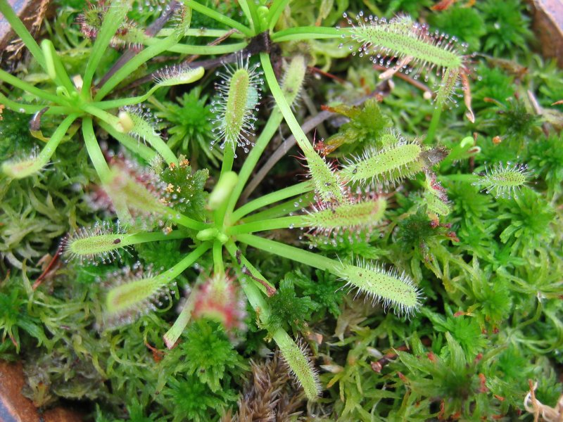 Drosera capensis